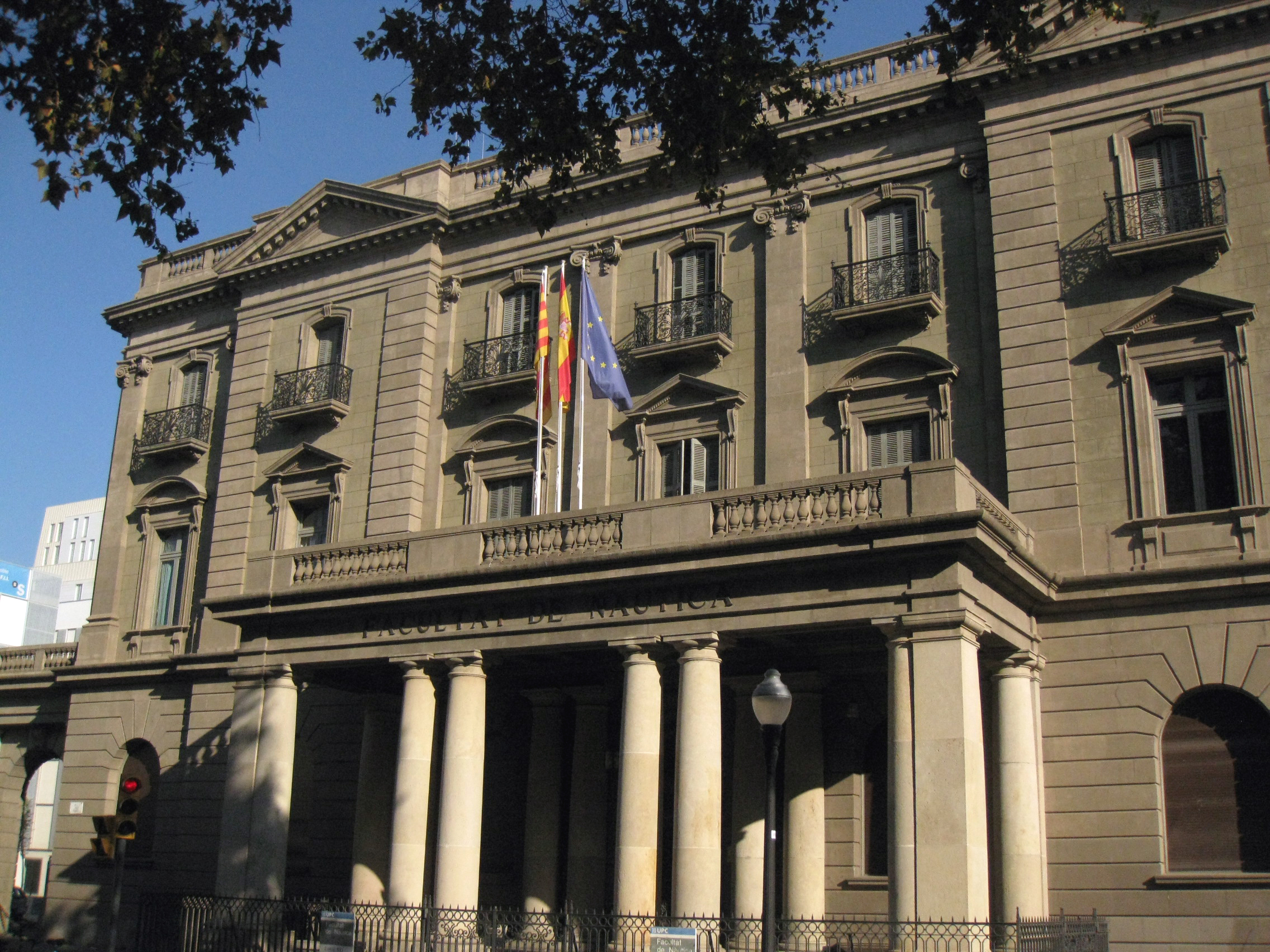 Facultat de Nàutica, edifici de Joaquim Vilaseca i Adolf Florensa (1930-33), a (Barcelona). Façana de la plaça de Pau Vila.